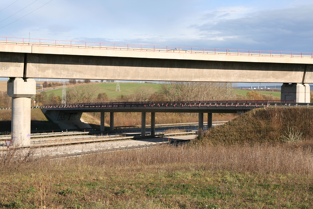 Die Geratalbrücke Ichtershausen der Neubaustrecke Ebensfeld-Erfurt überspannt sowohl die Autobahn als auch eine Landstraße